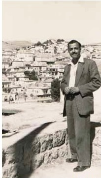 גמליאל בלבנון